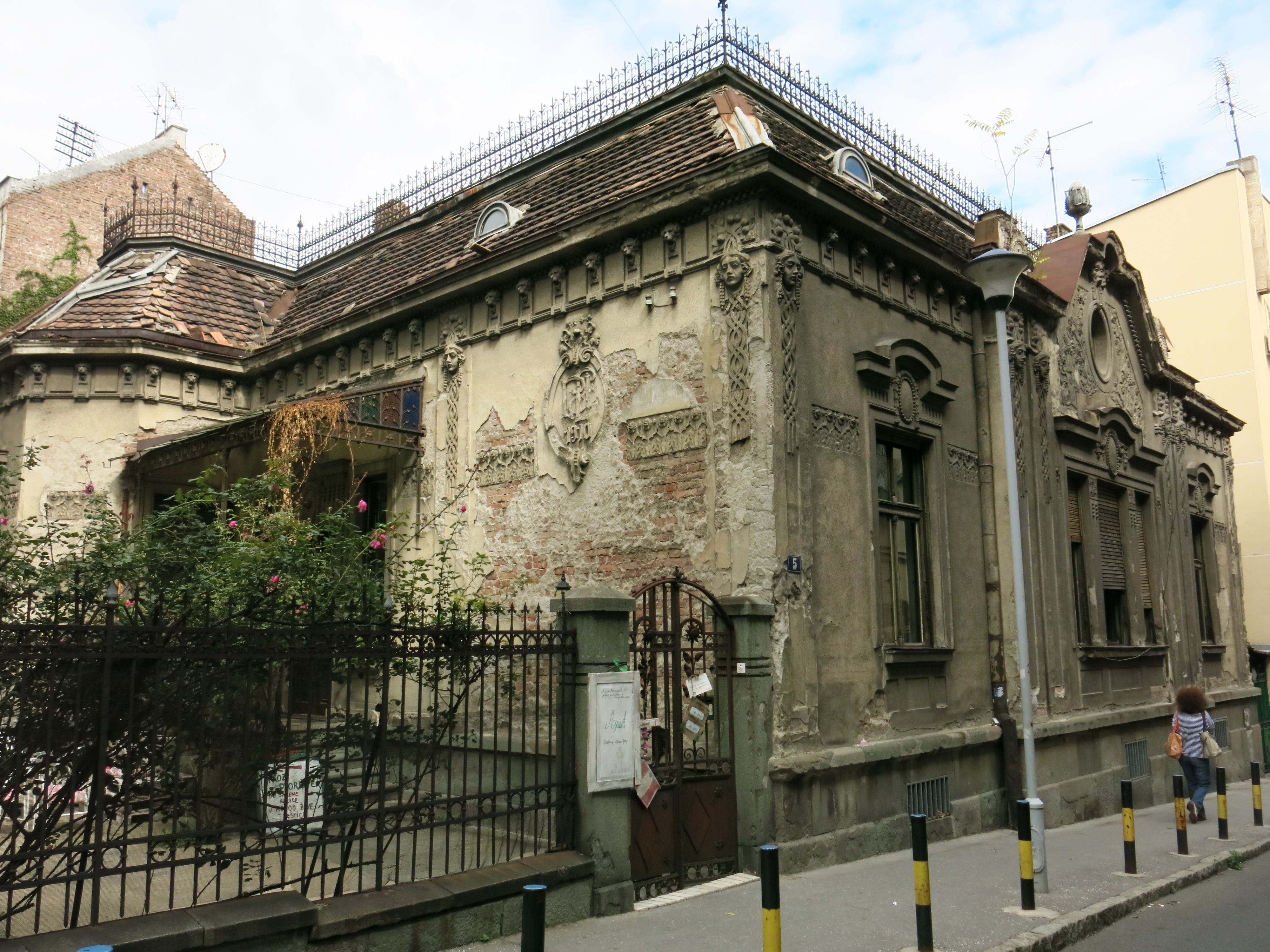 Кућа Радисава Јовановића